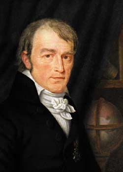 Johann Gottlieb Bohnenberger (Öl auf Leinwand, 1844). Ausschnitt aus dem Bildnis in der Tübinger Professorengalerie